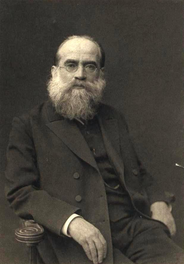 Русский философ-спиритуалист и психолог Лев Михайлович Лопатин (1855-1920)